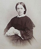 Marija Trubnikova (1835-1897)